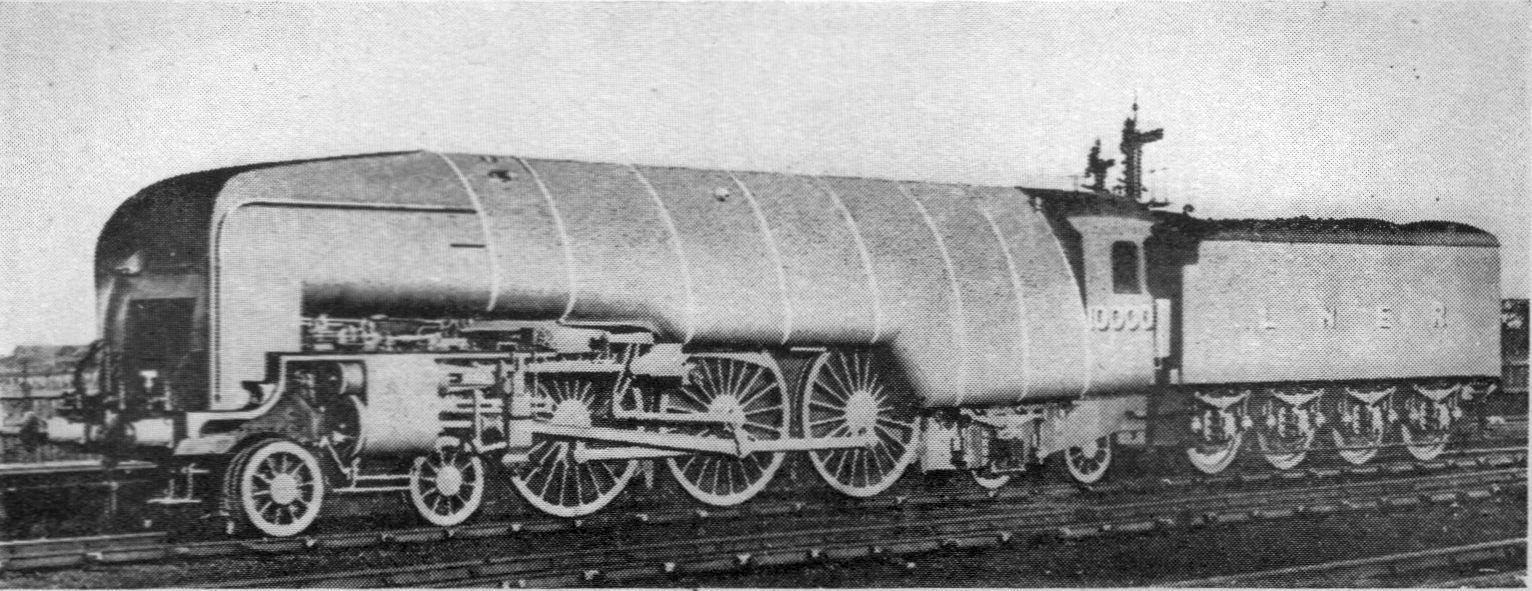 Engine 10000 (Wonder Book of Engineering Wonders, 1931).jpg